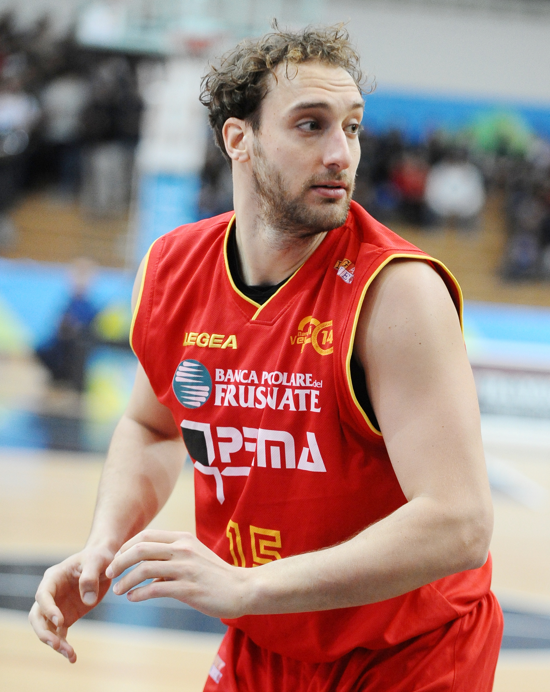 Tommaso Rinaldi con la maglia del Veroli Basket durante una partita contro l'Aquila Basket al PalaTrento.